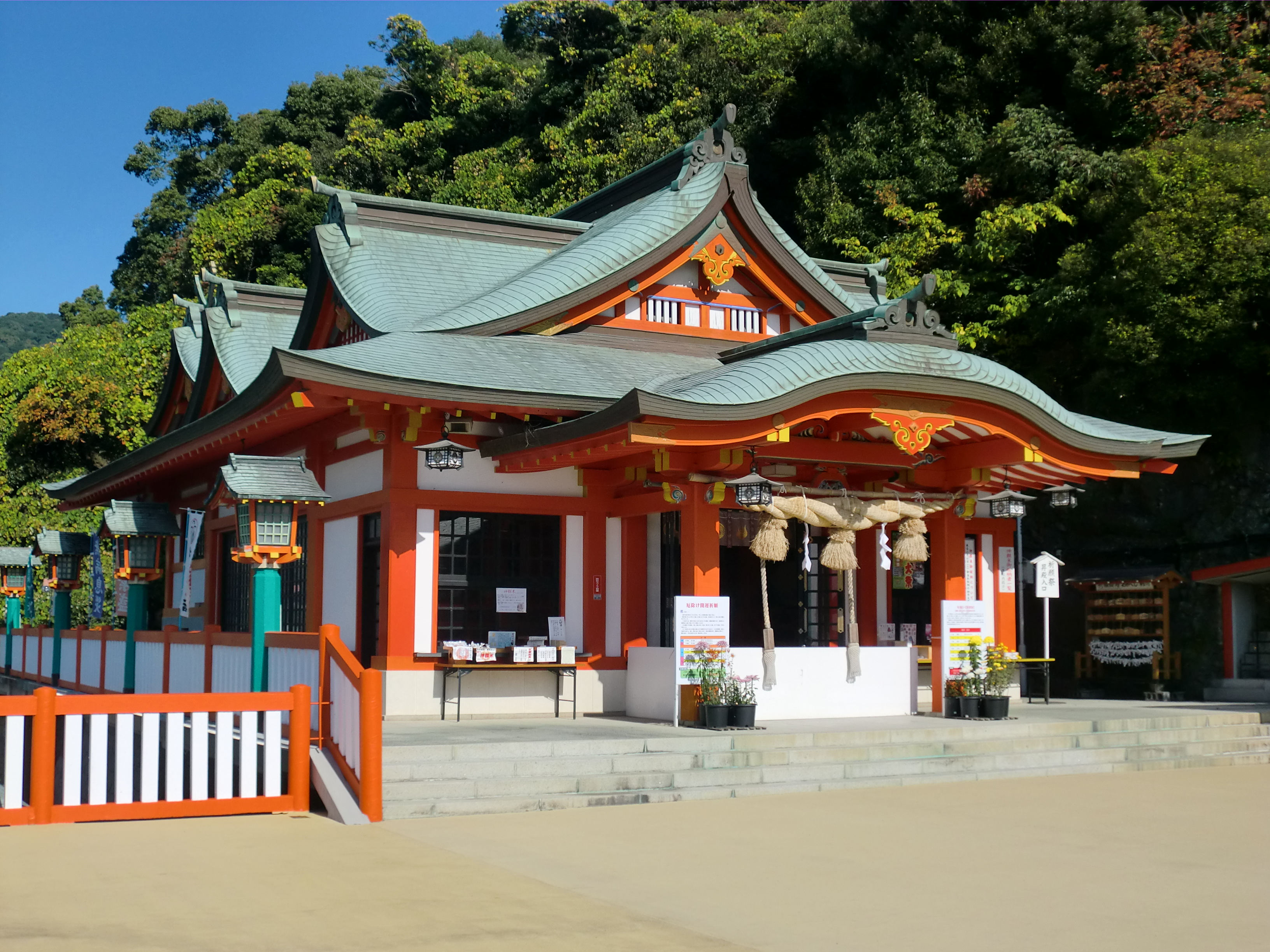 熊本市西区にある高橋稲荷神社